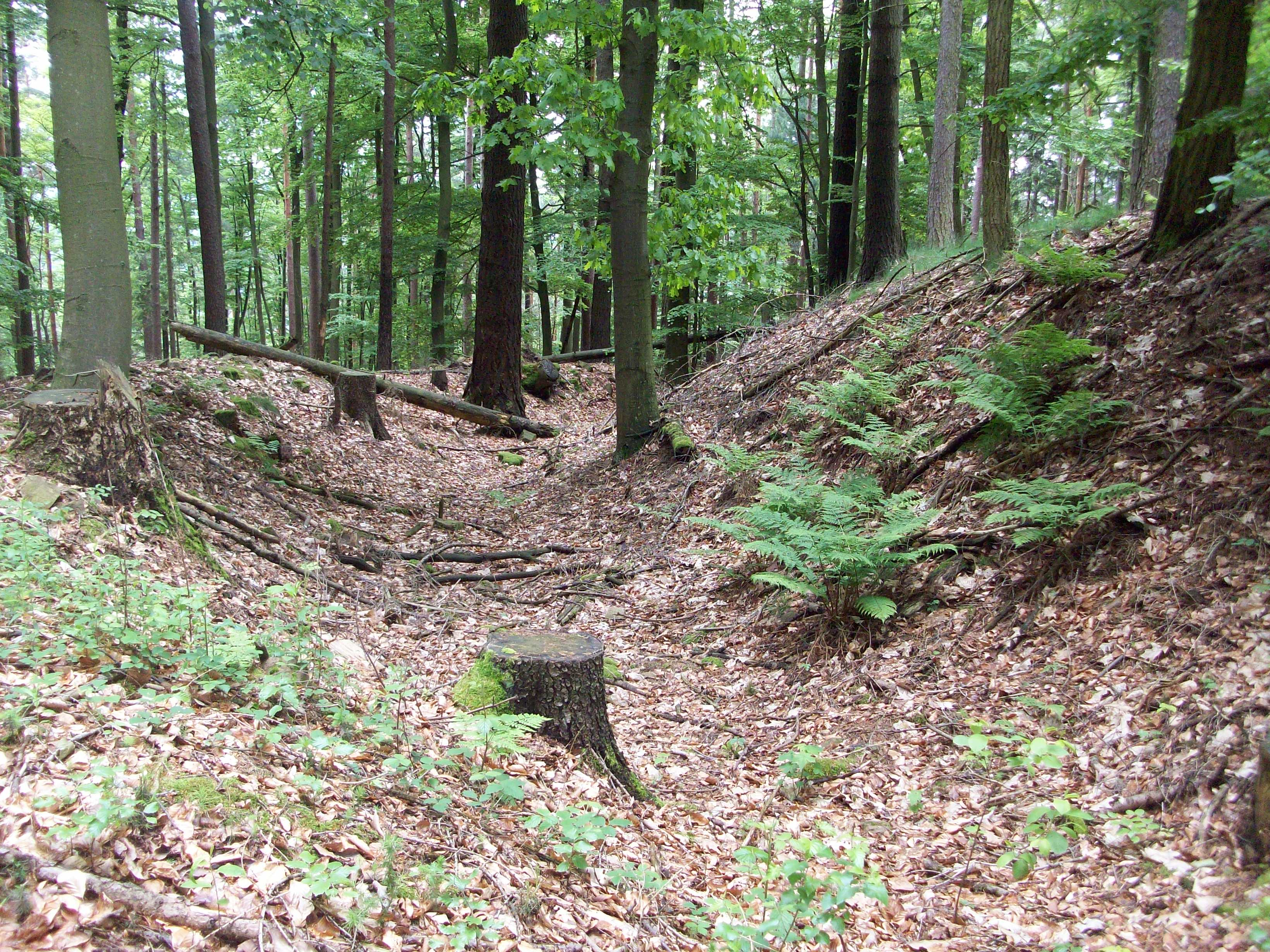 Alte Burg oder auch Altenburg auf dem Reuschberg bei Schöllkrippen, Blick in den Wallgraben Richtung Süden